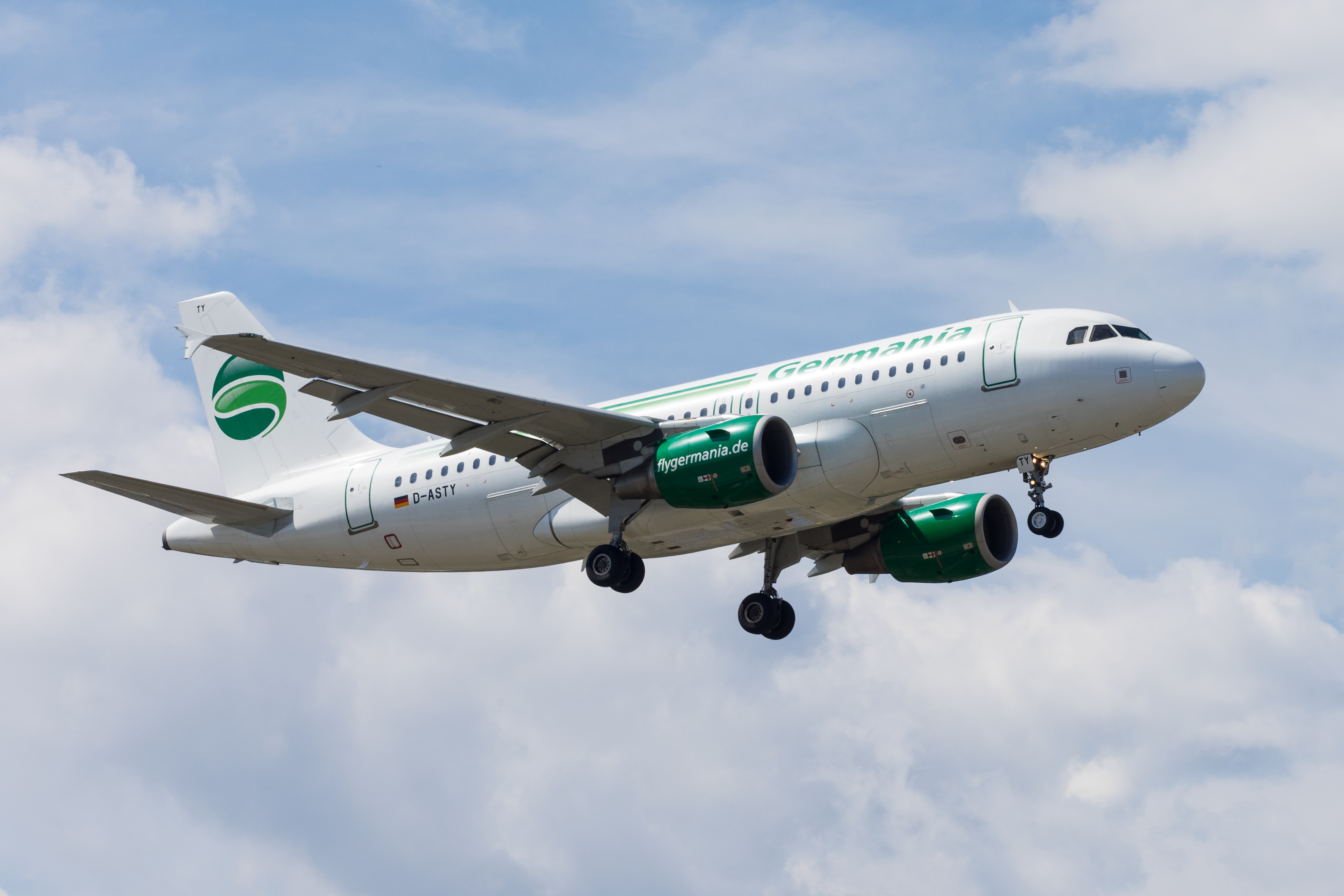 GVA 20.08.2015